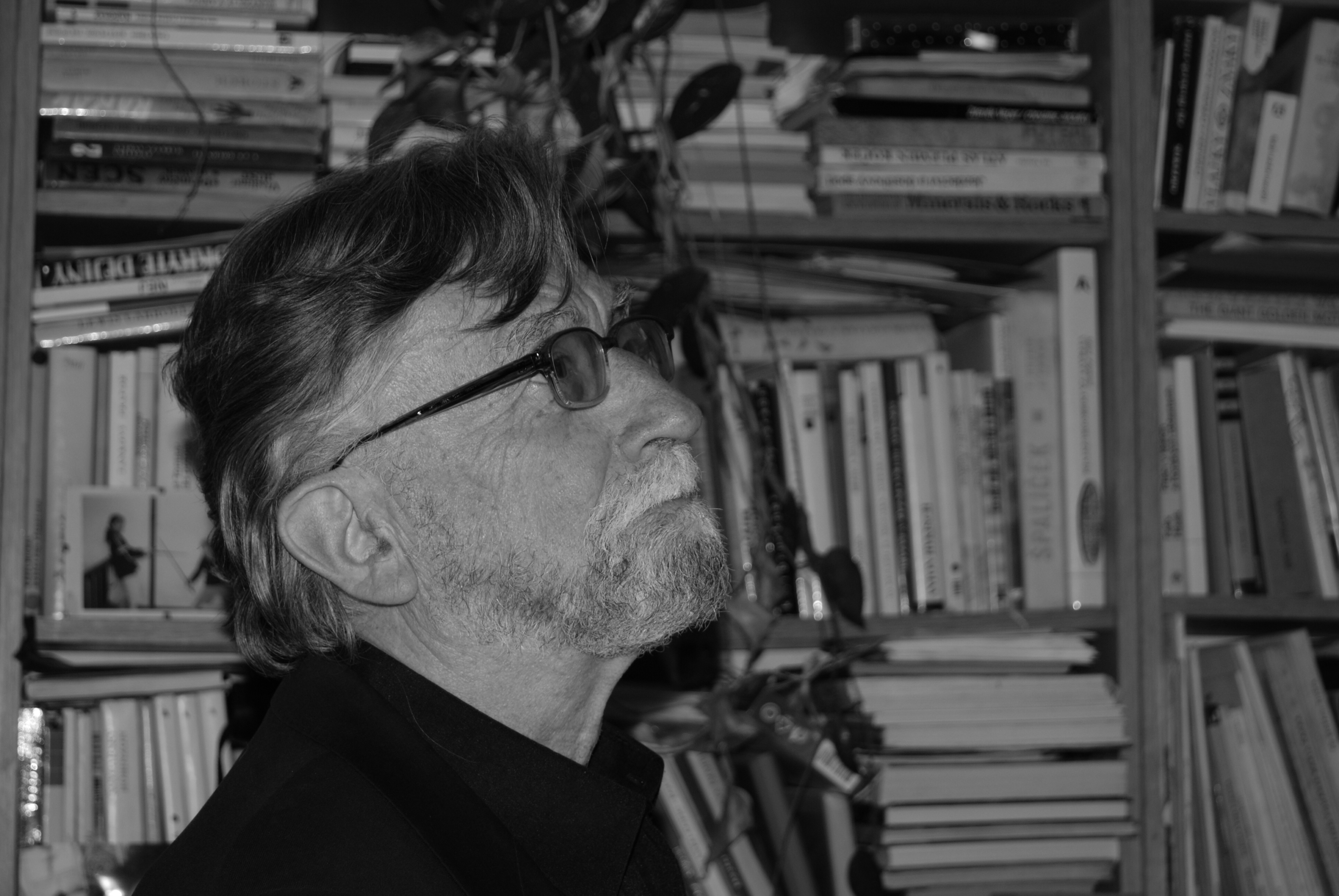 Prof. Jan kořenský